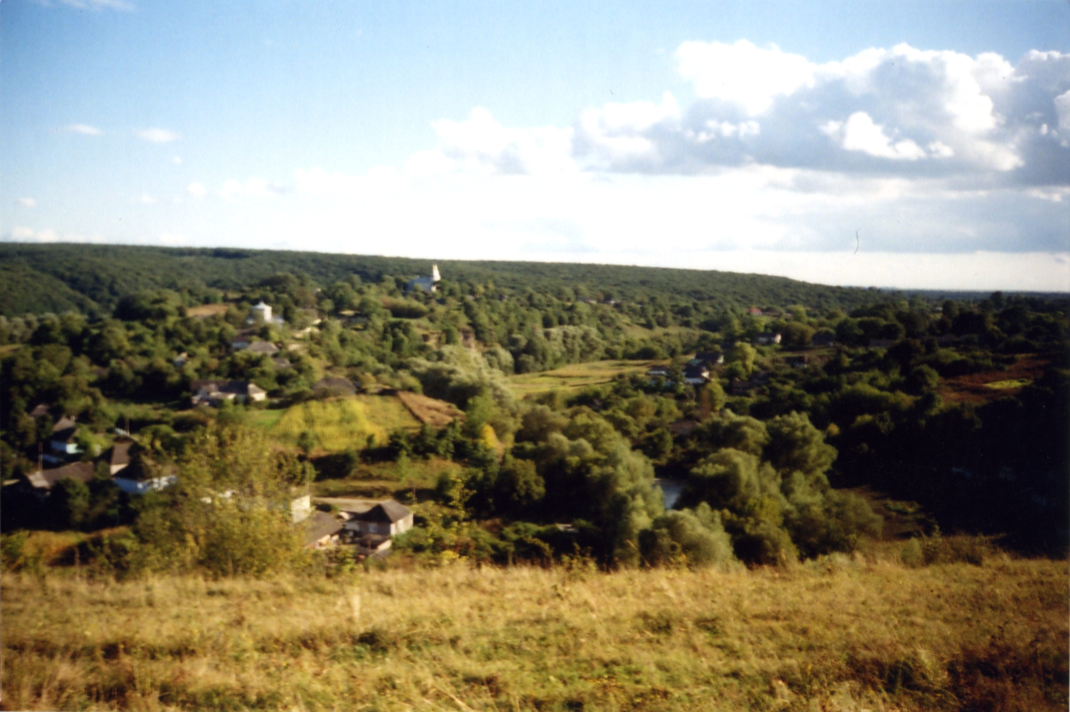 Загальний вид села Черче з обома півостровами.